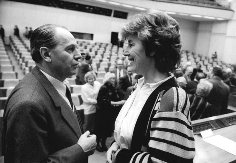 ADN-ZB Mittelstädt 1.12.1989 Berlin: 13. Volkskammer-Tagung Prof. Dr. Christa Luft (r.) Stellvertreterdes Vorsitzenden des Ministerrates für Wirtschaft, im Gespräch mit Witho Holland, Mitglied des Politischen Ausschusses des Zentralvorstandes der LDPD.